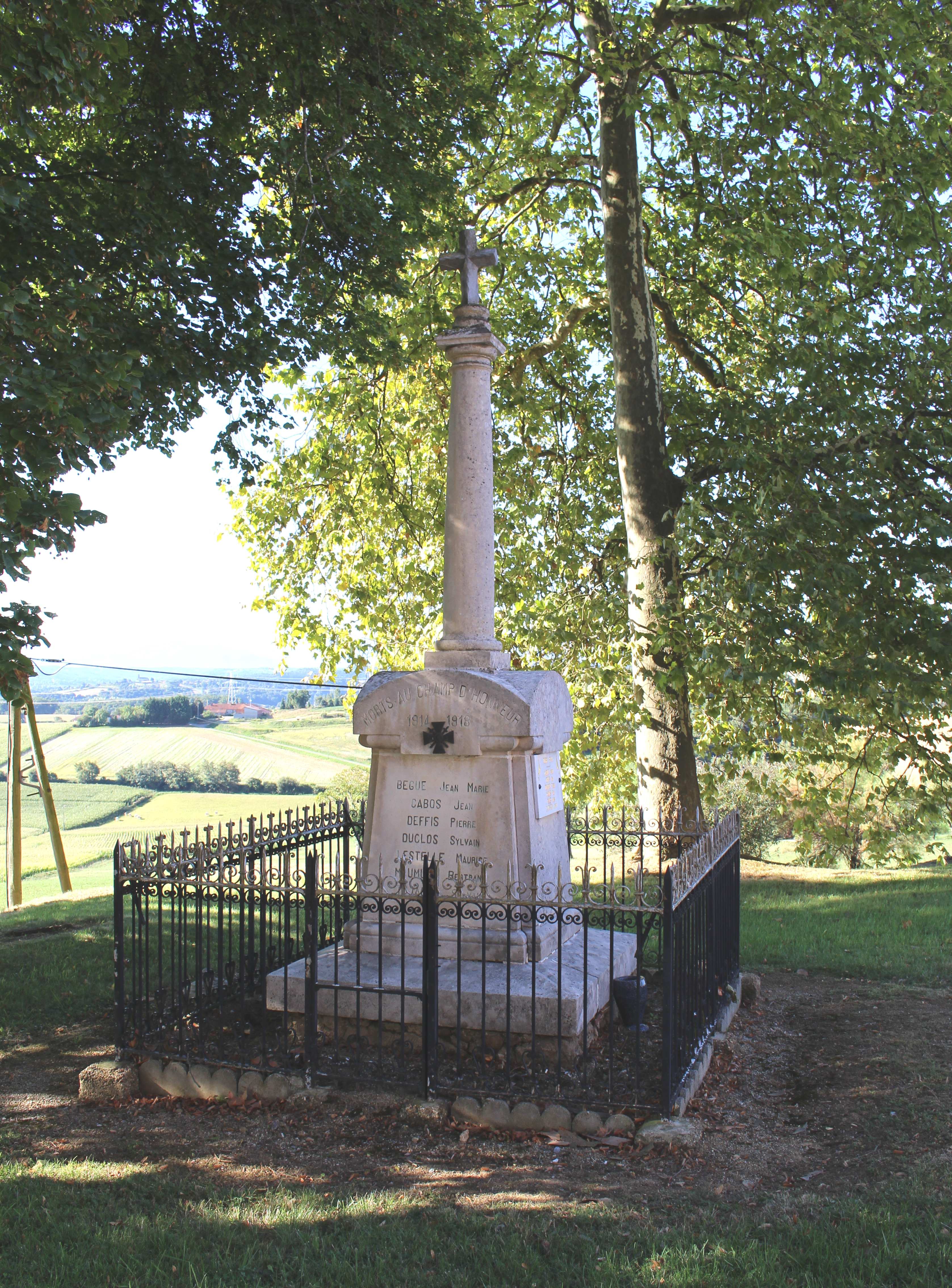 Monument aux morts de Puydarrieux (Hautes-Pyrénées)